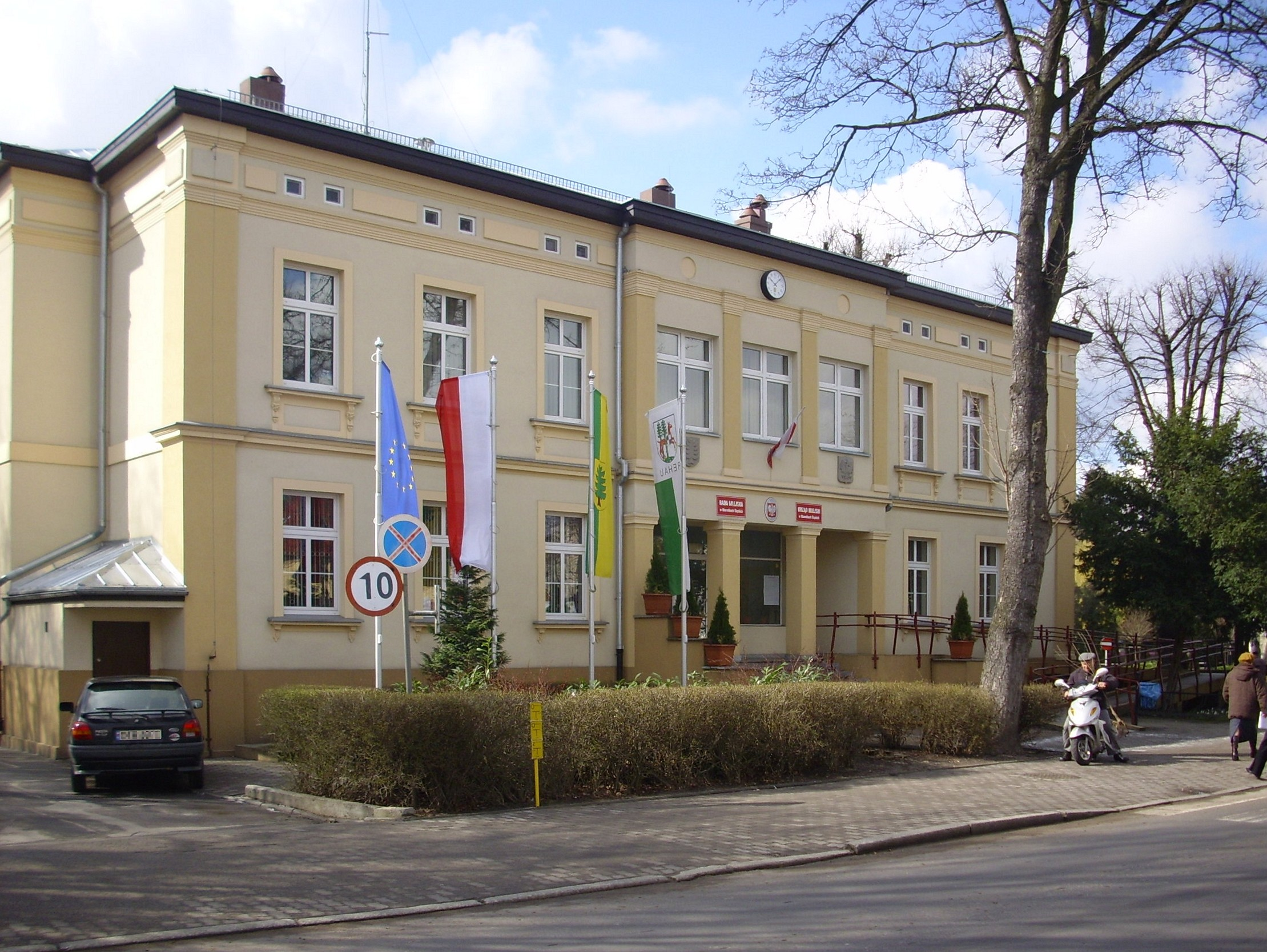 Oborniki Śląskie. Urząd miasta i gminy.